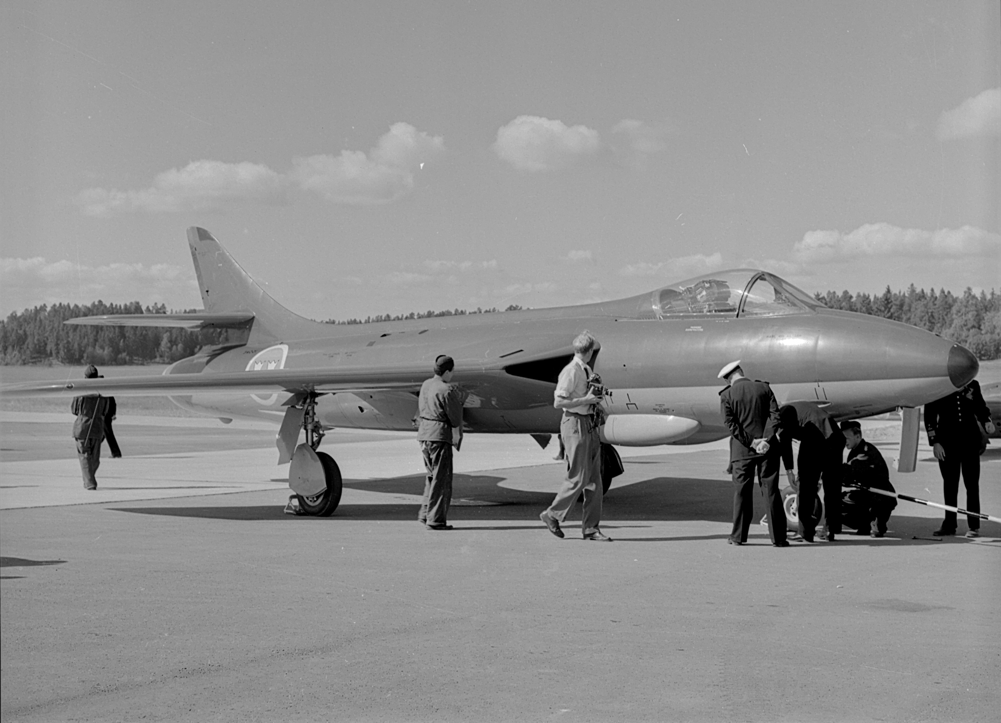 Första J 34 Hunter har precis landat på F18 Tullinge